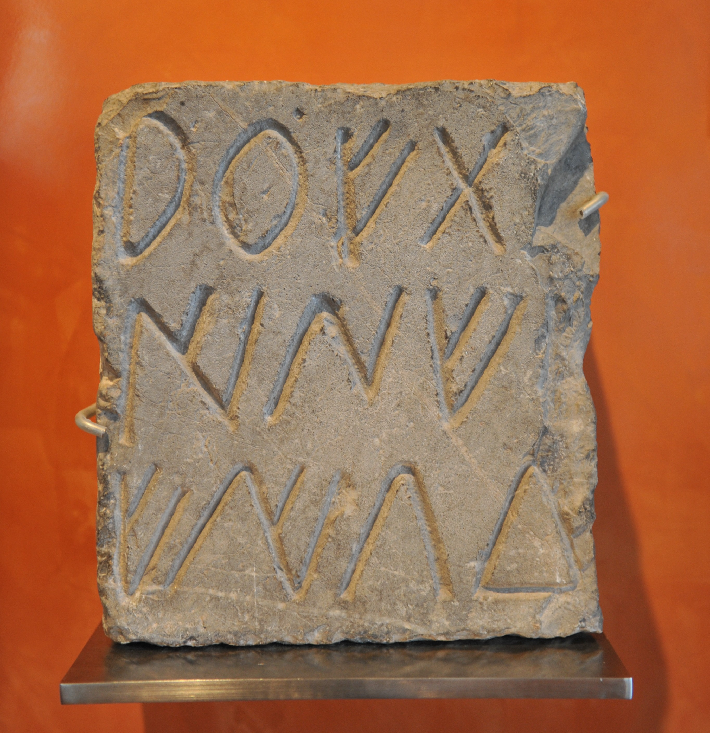 Inscripció. Època ibèrica. Procedència desconeguda. Museu Arqueològig de Sagunt. Inv. S.1.210